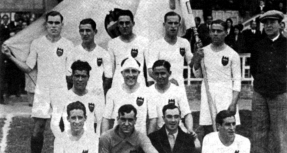 L'equip del València FC que va ascendir a primera el 31. De peu: Torredeflot, Picolín, Vilanova, Costa, Sánchez (capità) i l'entrenador Anton Fiverb. De genolls: Salvador, Molina i Conde. Assentats: Melenchón, Cano, Villarroya i Torregaray.